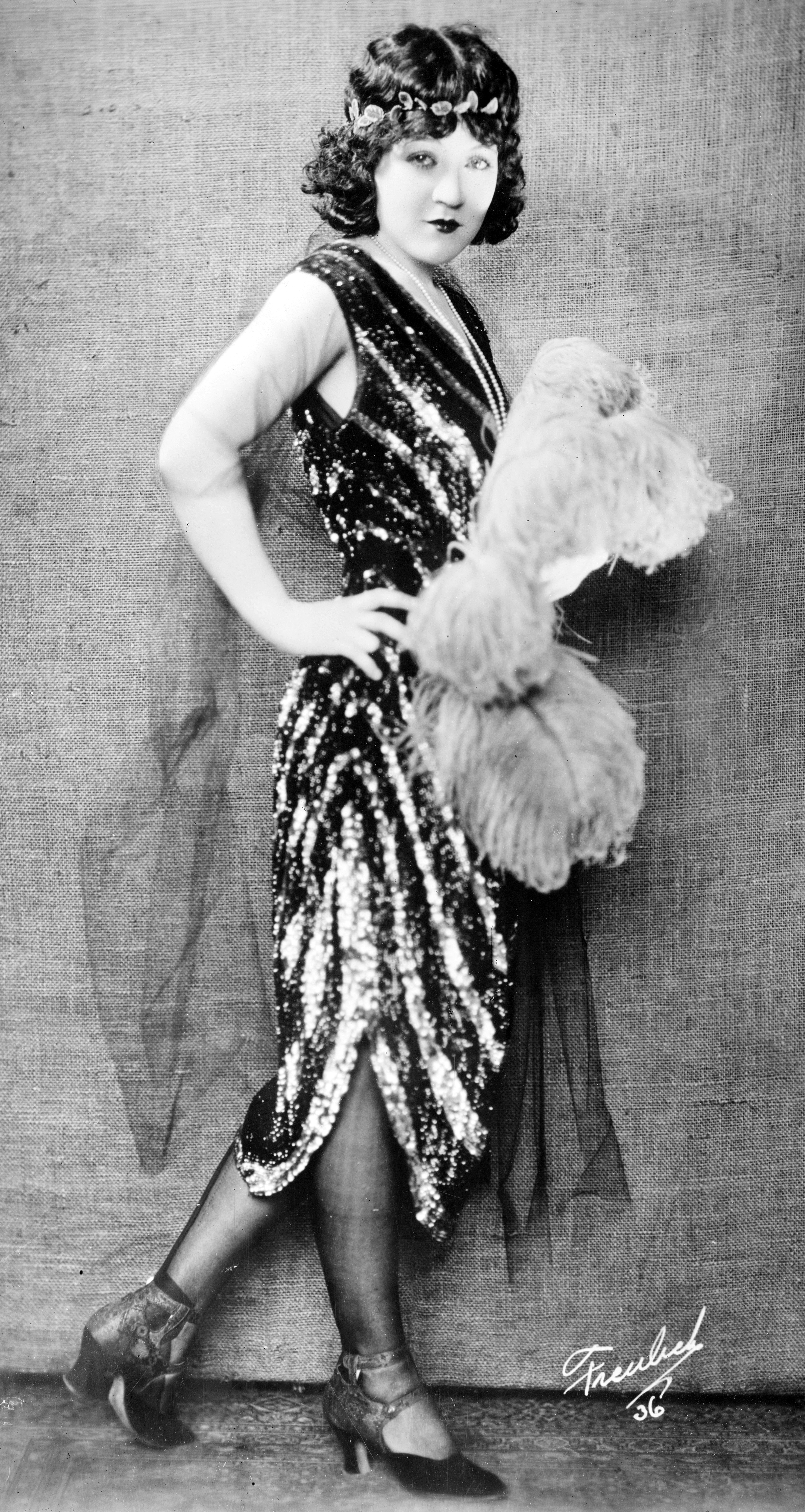 Actress Marie Prevost